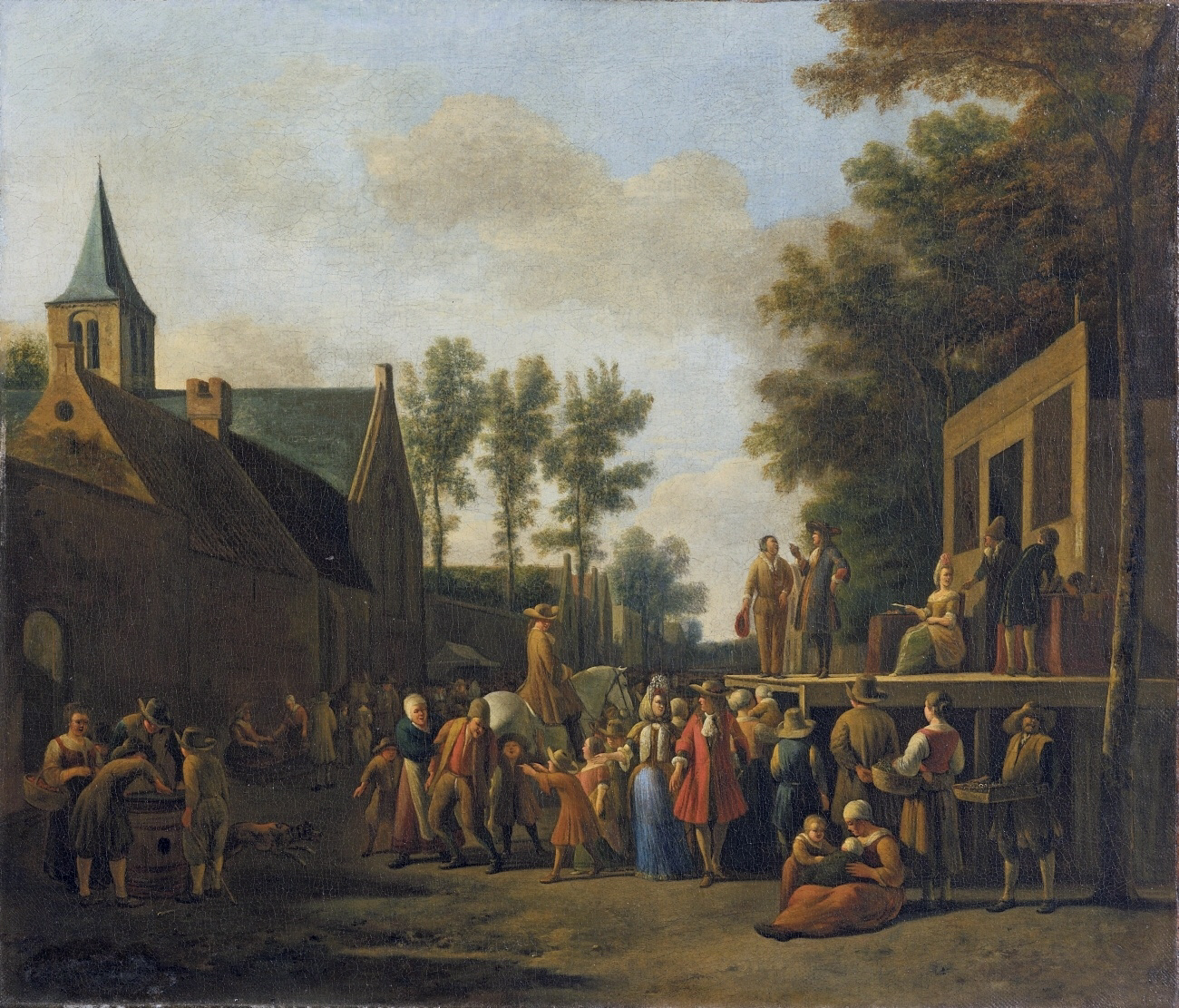 Stadtansicht mit Wanderbühne. Von Gerrit Adriaensz. Berckheyde (Bildarchitektur) und Job Adriaensz. Berckheyde (Figuren).